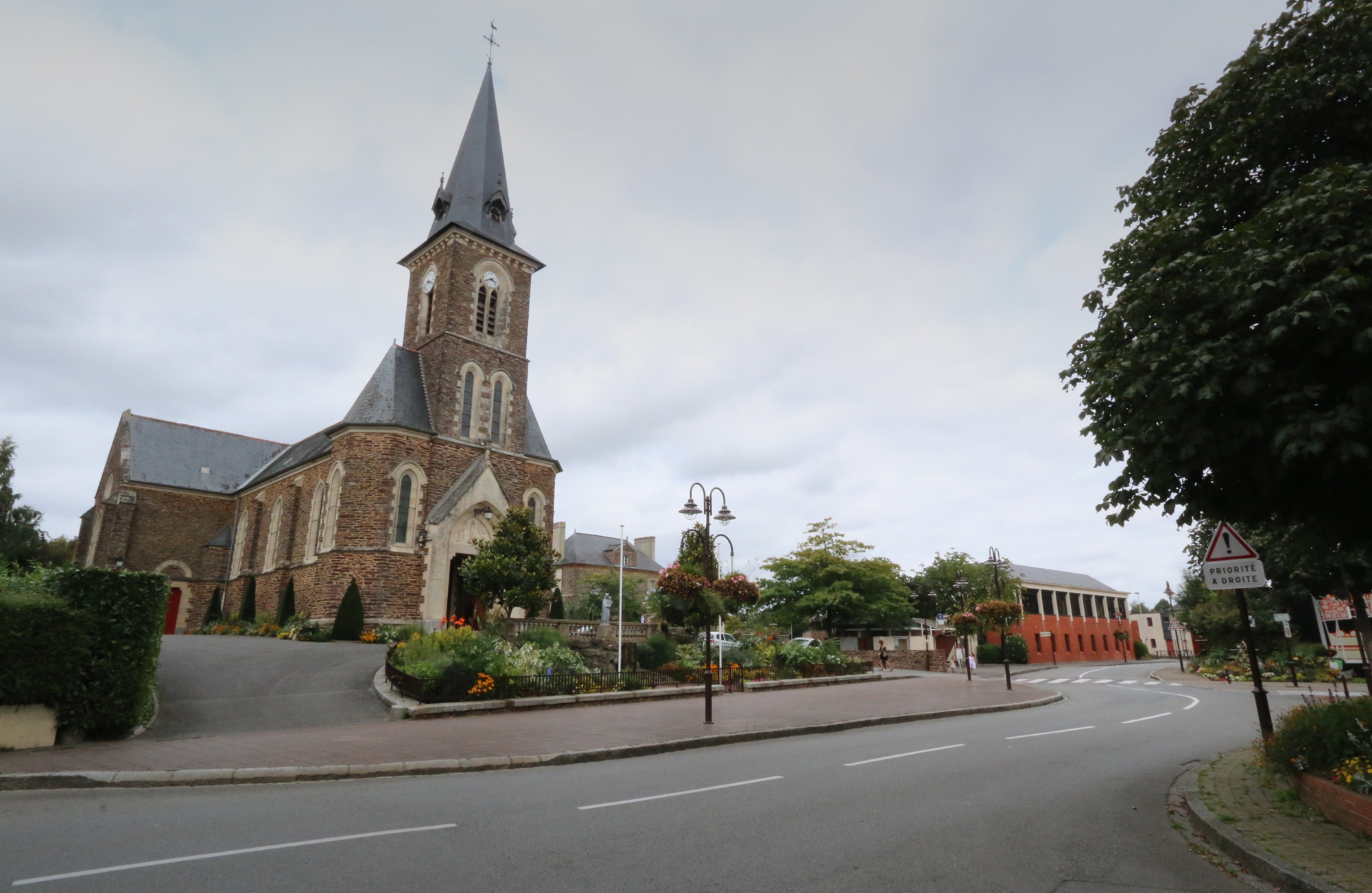 Église Notre-Dame de Chartres-de-Bretagne